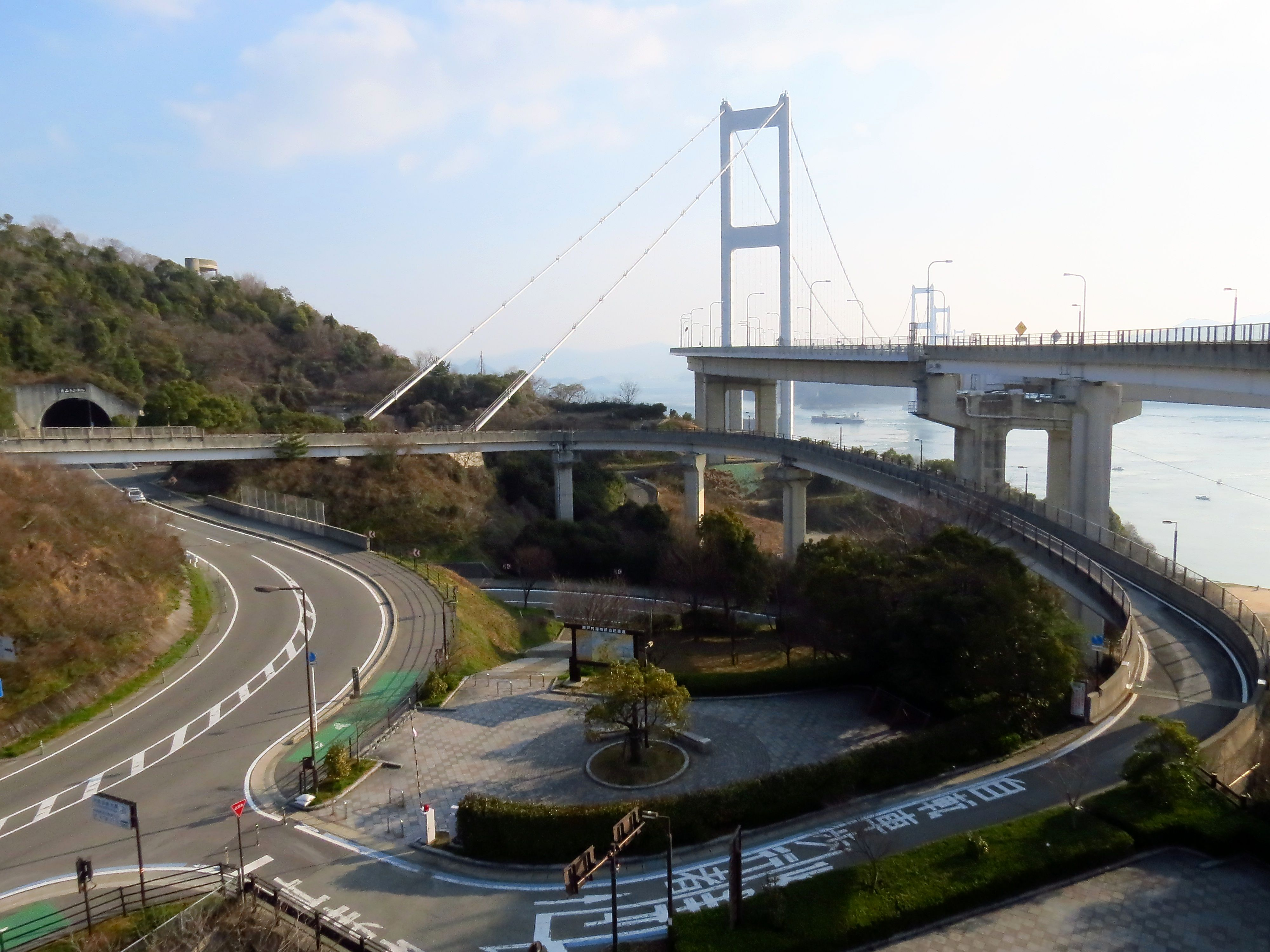 Kurushima-Kaikyo Bridge